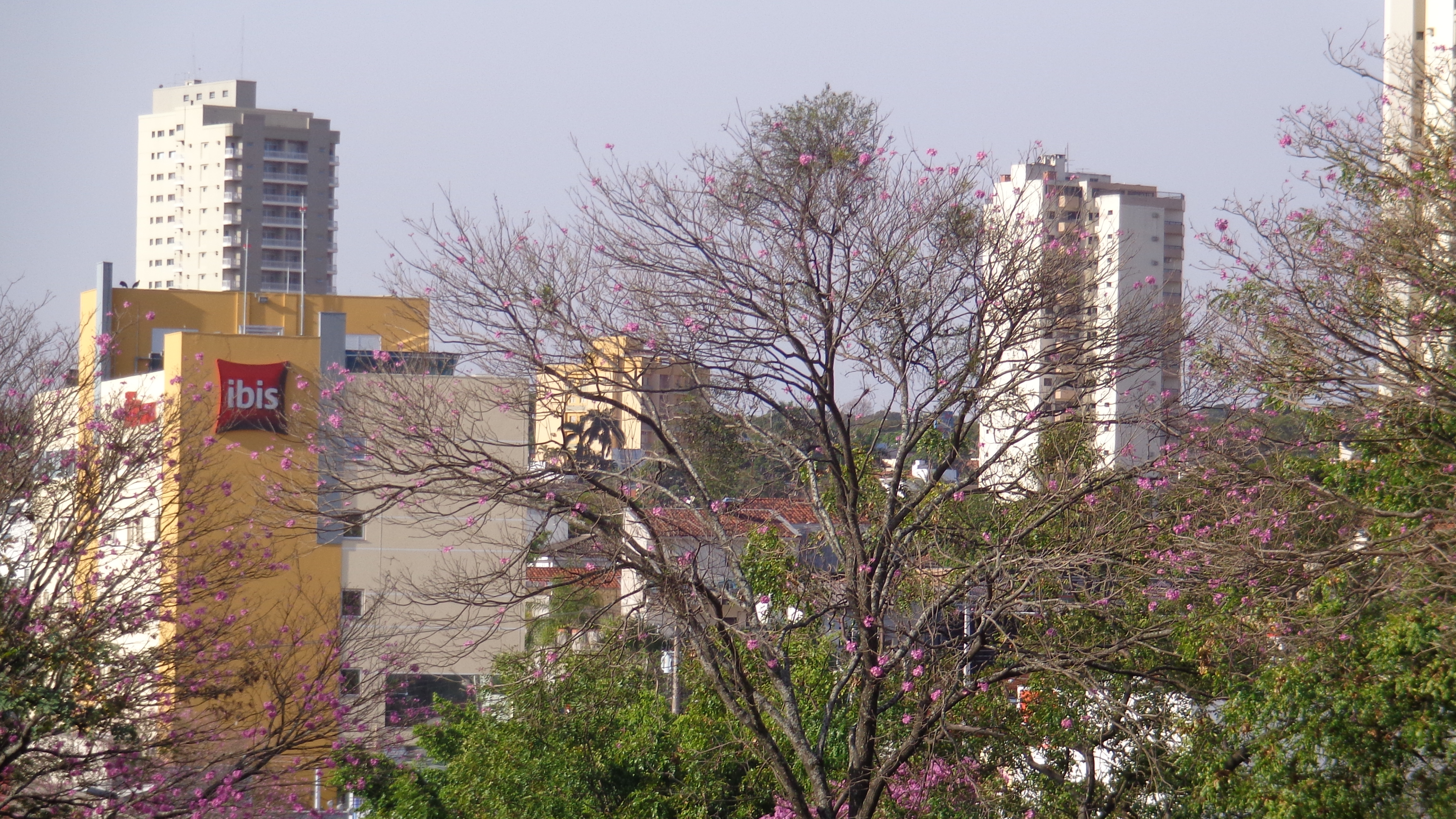 Parte Hotel Ibis